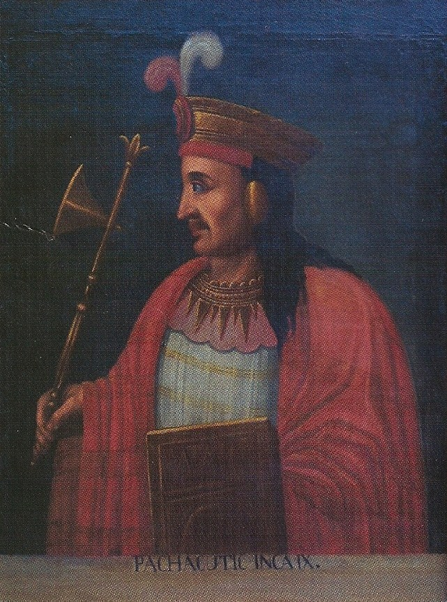 Noveno inca: Pachacútec, cuadro cusqueño de artista desconocido (siglo XVII)